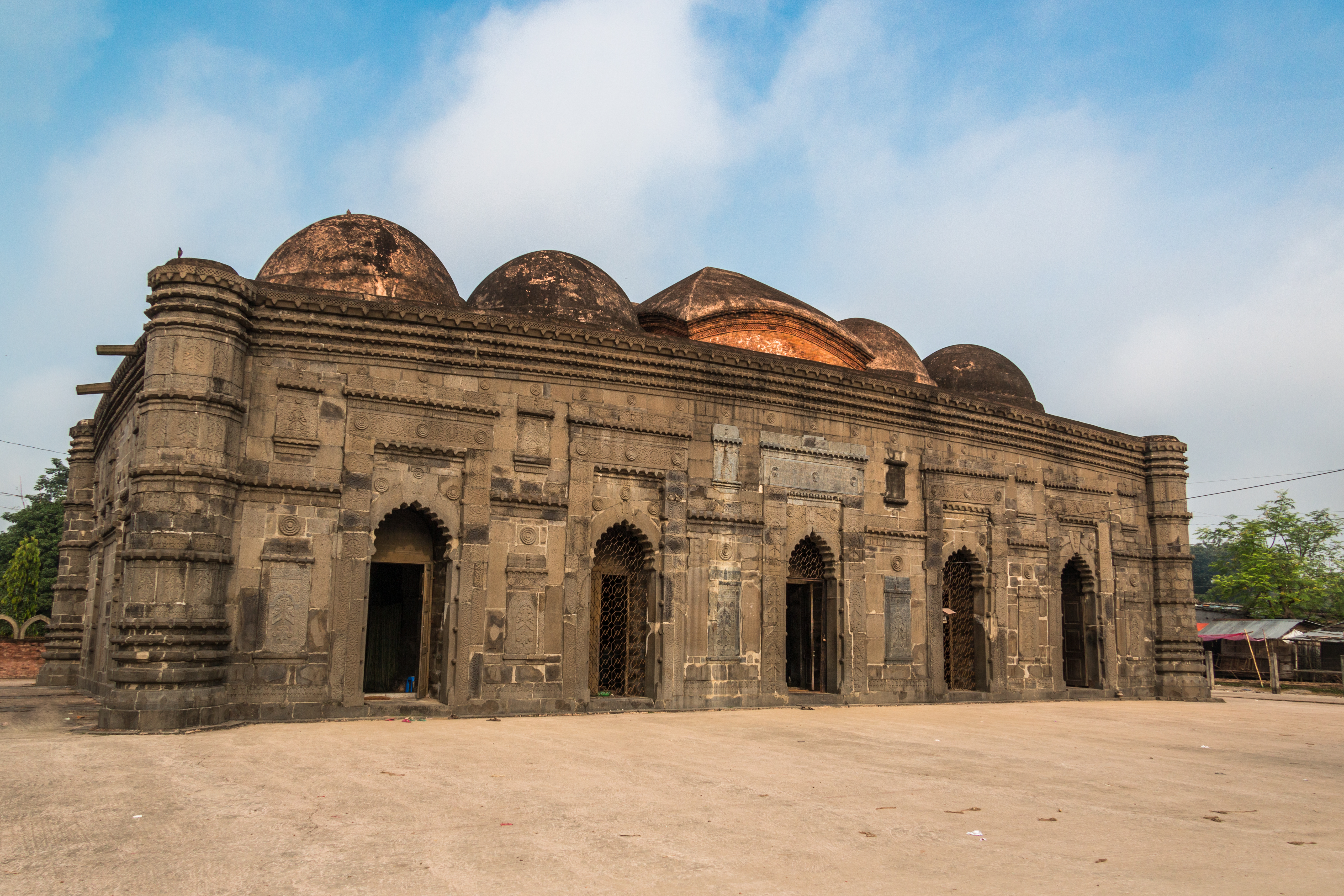 ছোট সোনা মসজিদ